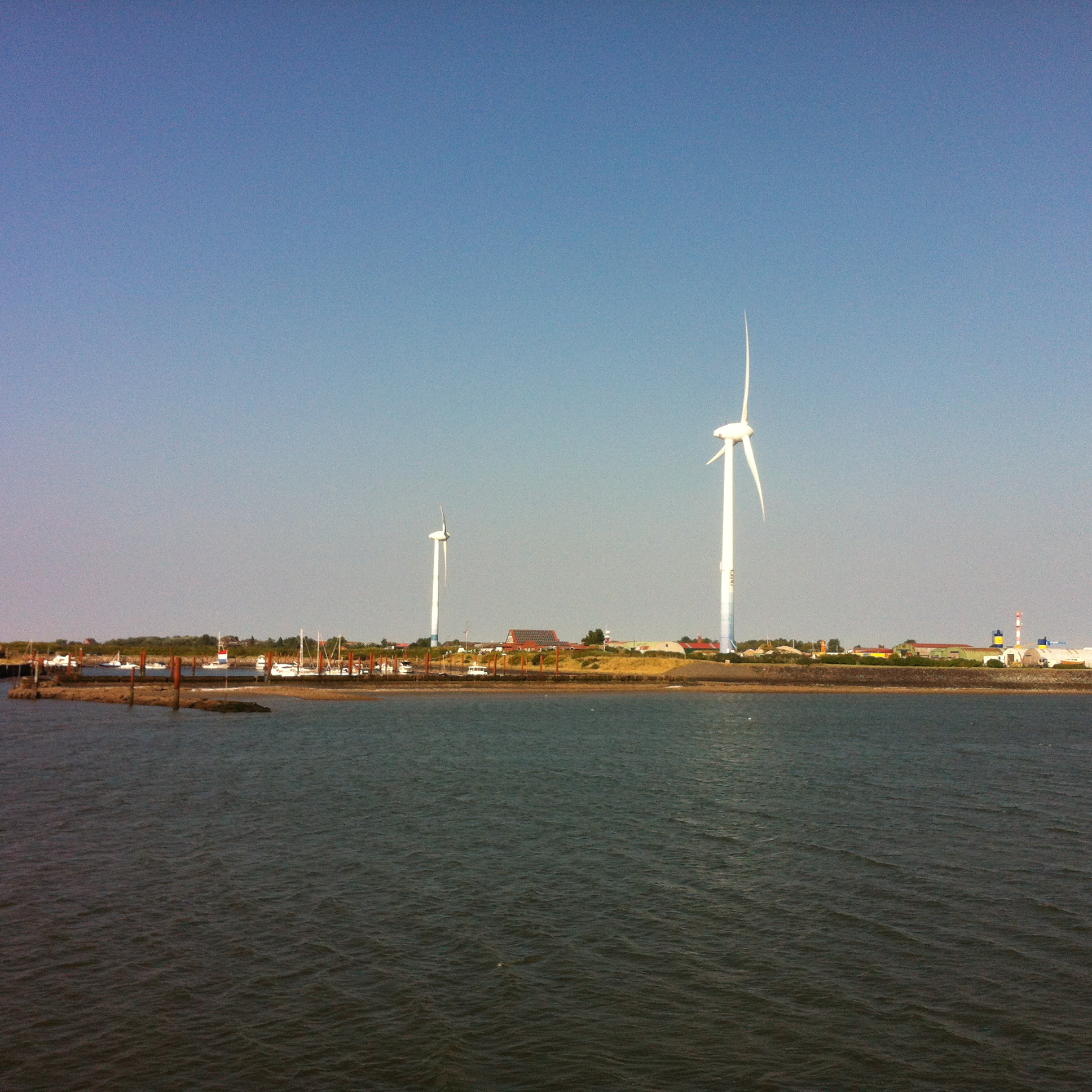 Zwei Windenergie-Anlagen im Hafen von Borkum